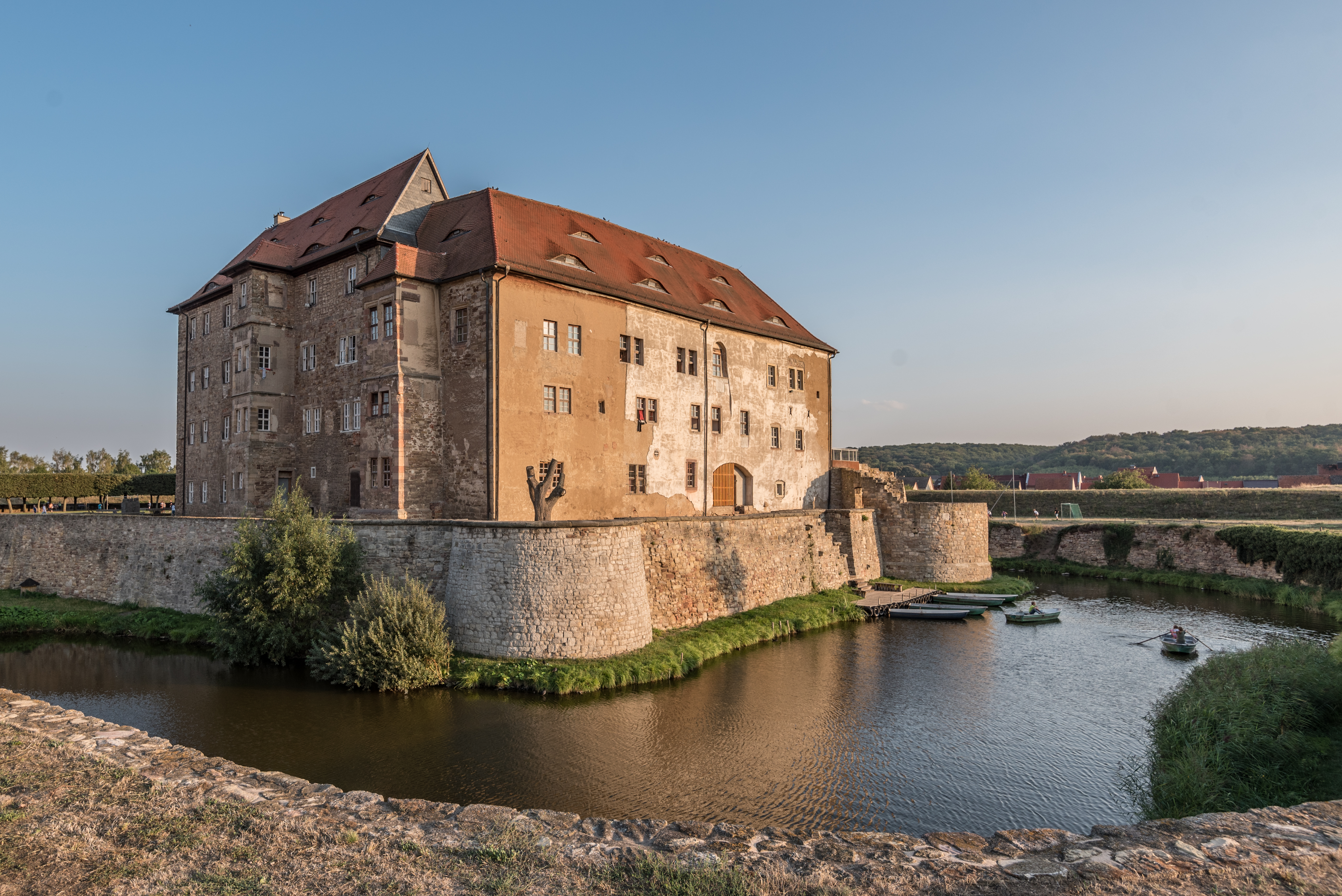 Heldrungen, Wasserburg, von Nordwesten